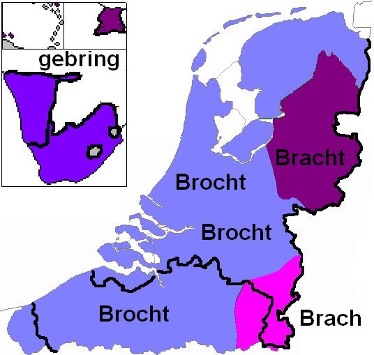 Eigen kaart